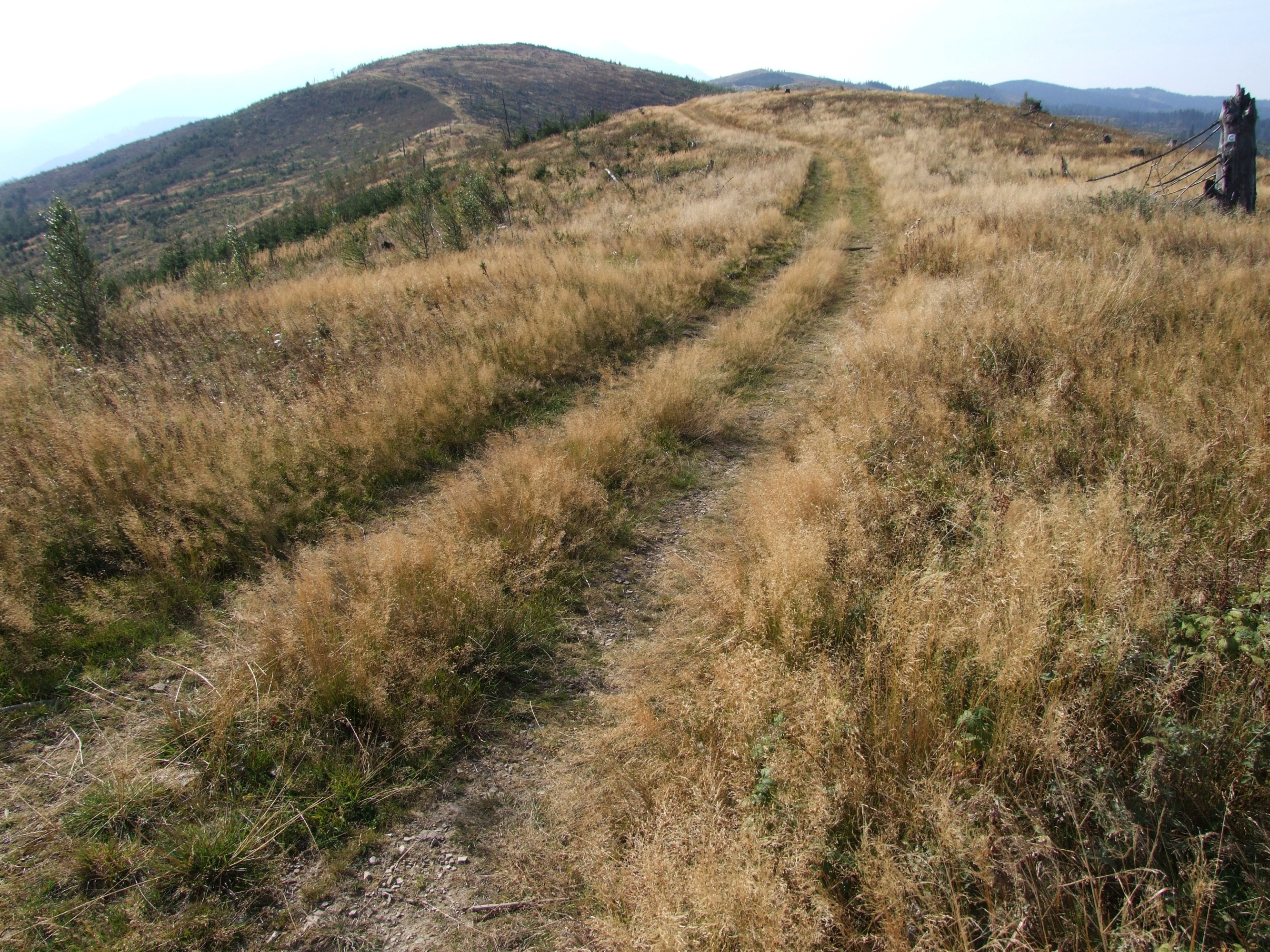 Grań Magury Spiskiej po huraganie w 2004 r. Na środku u góry wierzchołek Godšinová